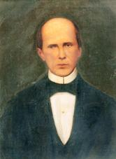 Gallego ecuatoriano